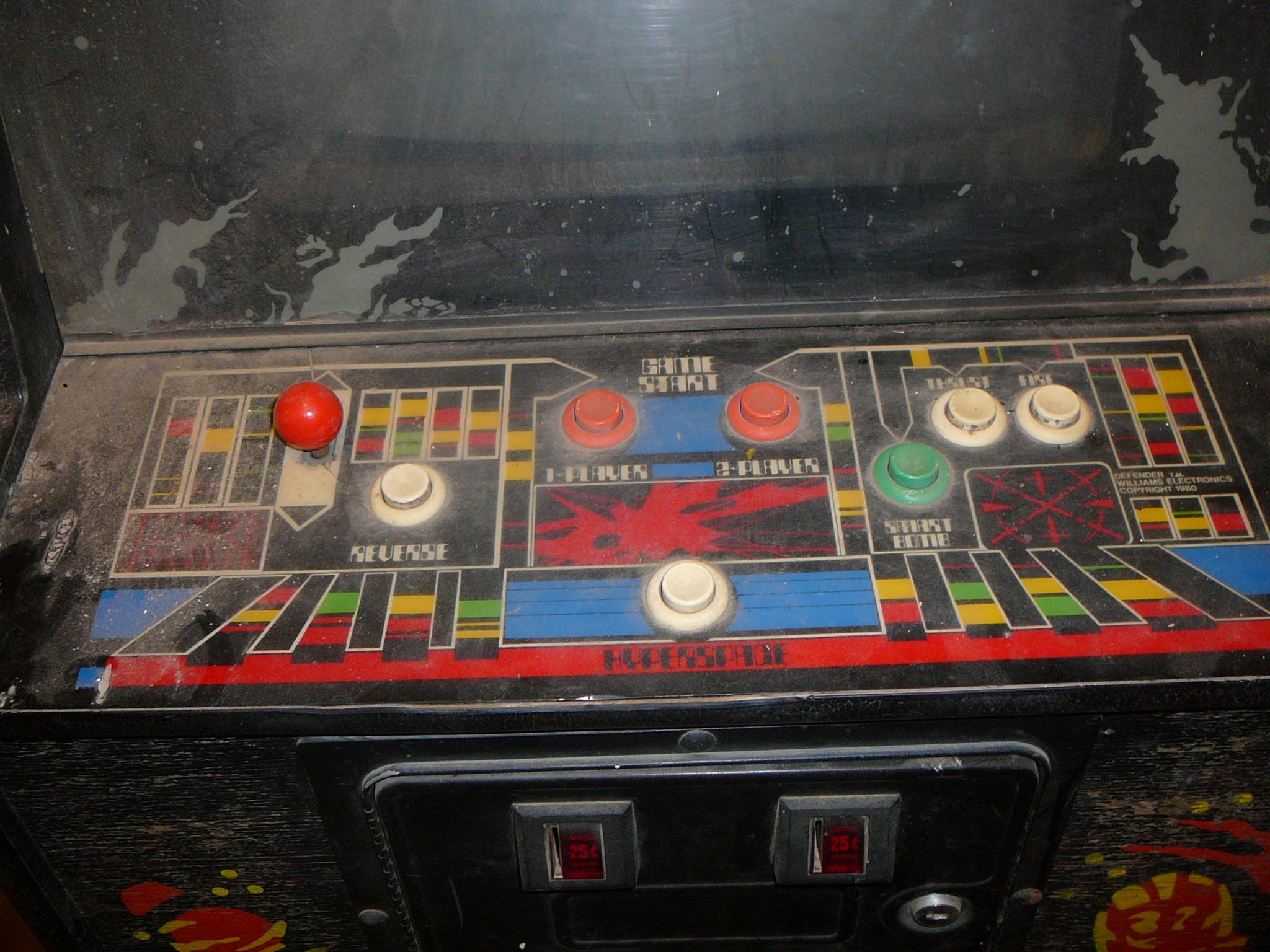 control panel of arcade game DefenderMy Defender cab